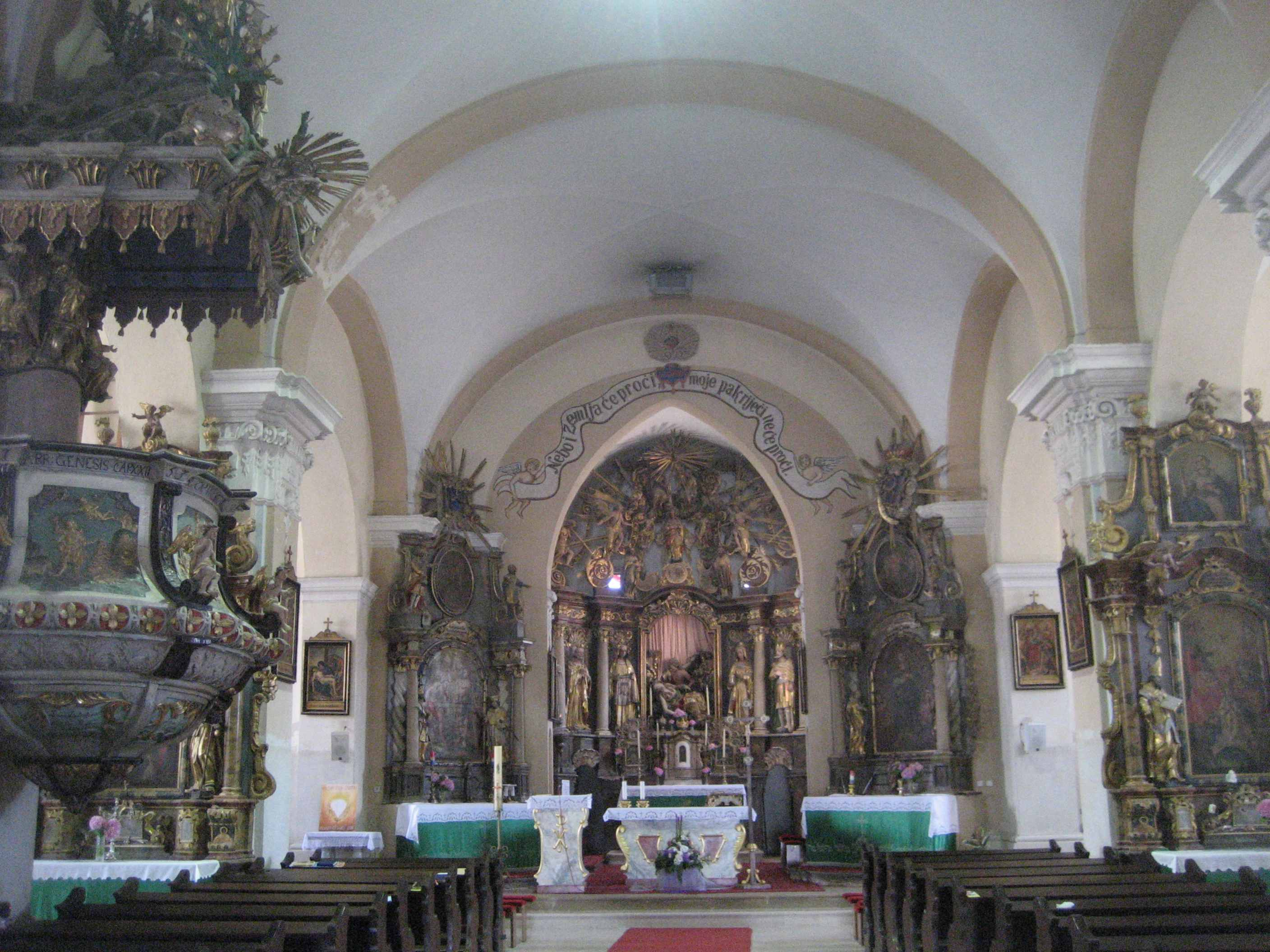 Unutrasnjost crkve Sv. Marije Magdalene u Cazmi